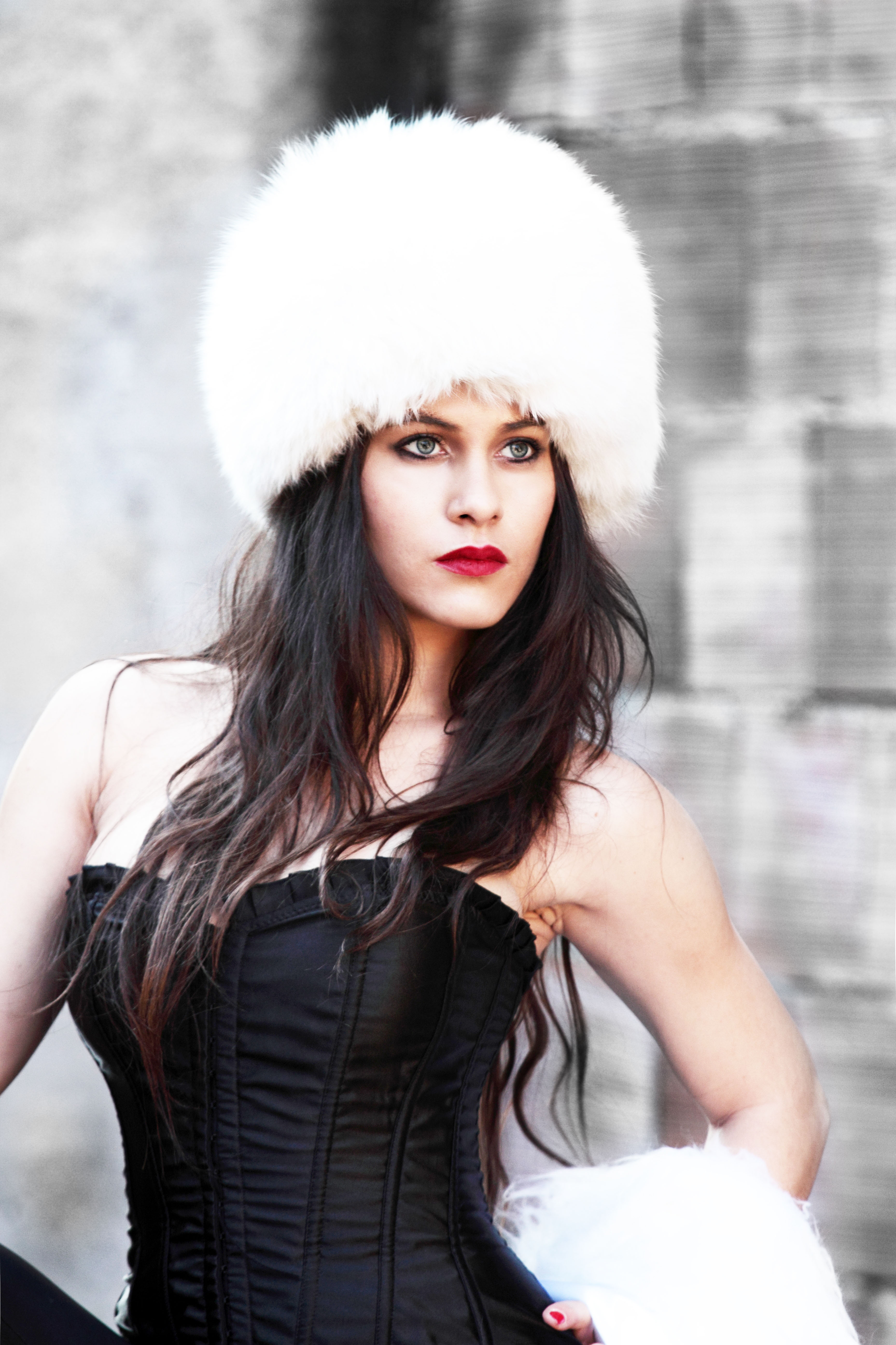 Tresy Taddei Takimiri